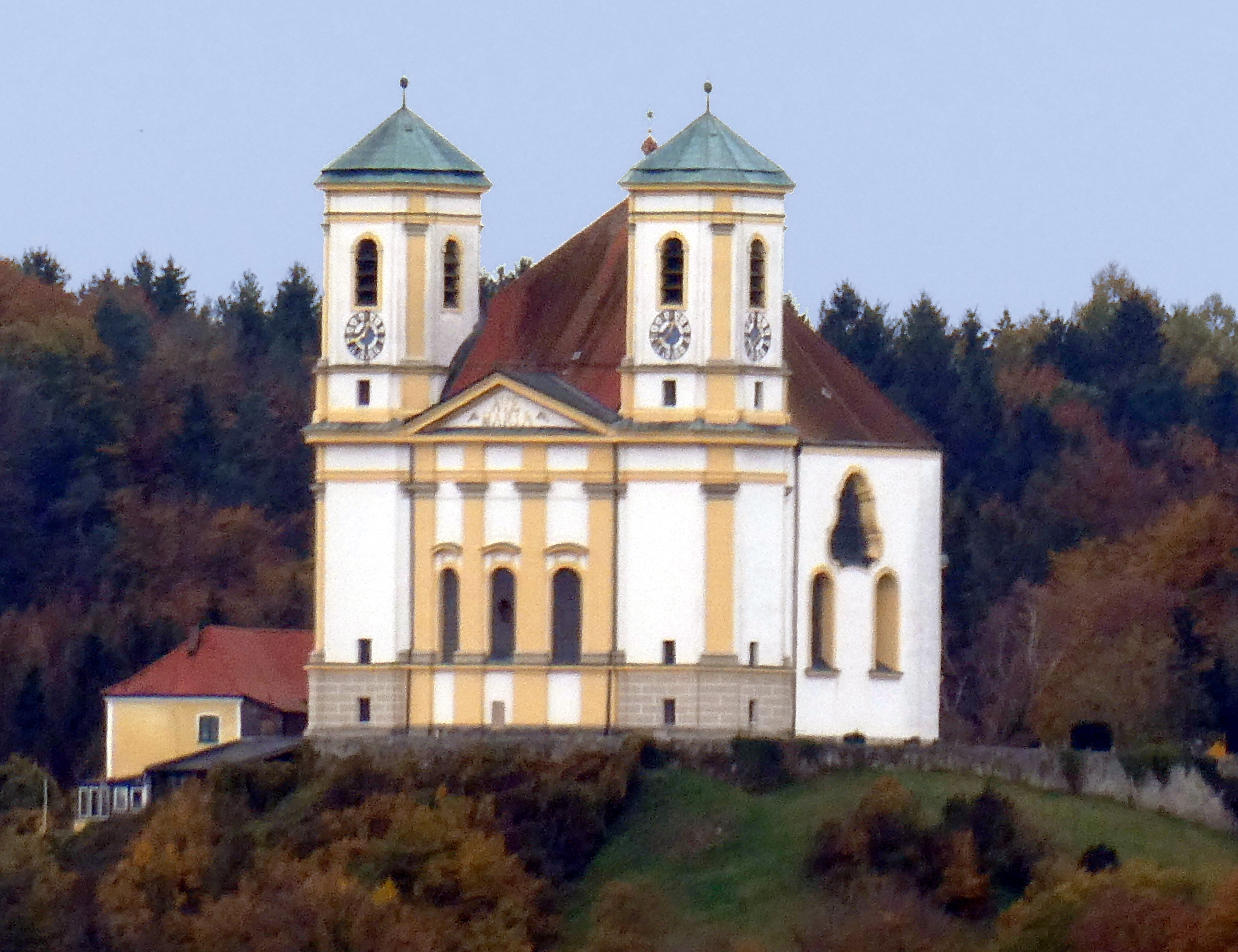 Boarisch: D' Wojfartskiach z' Mariaberg vo Ästareich aus xeng.